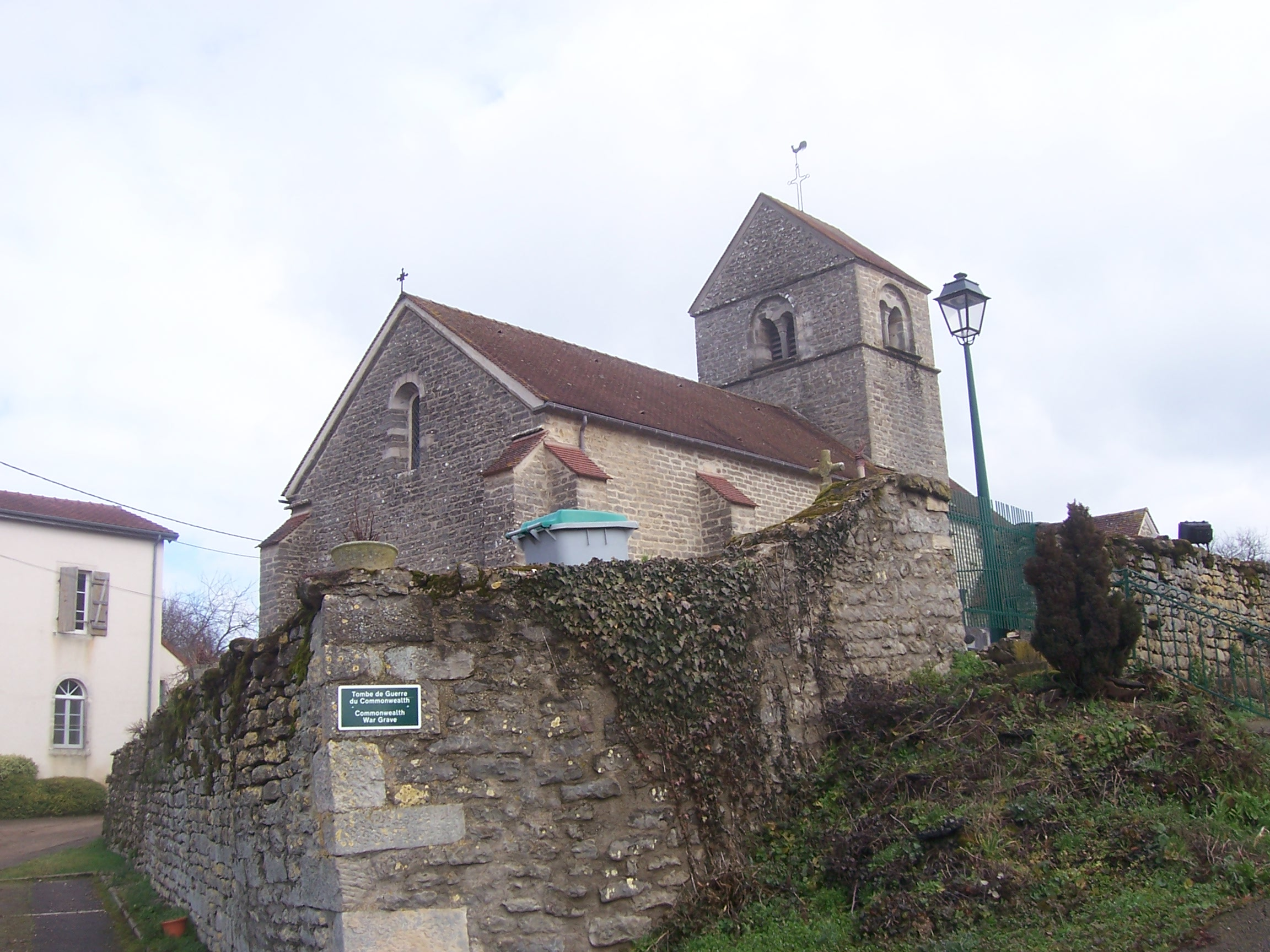 Eglise de Bessey-la-Cour